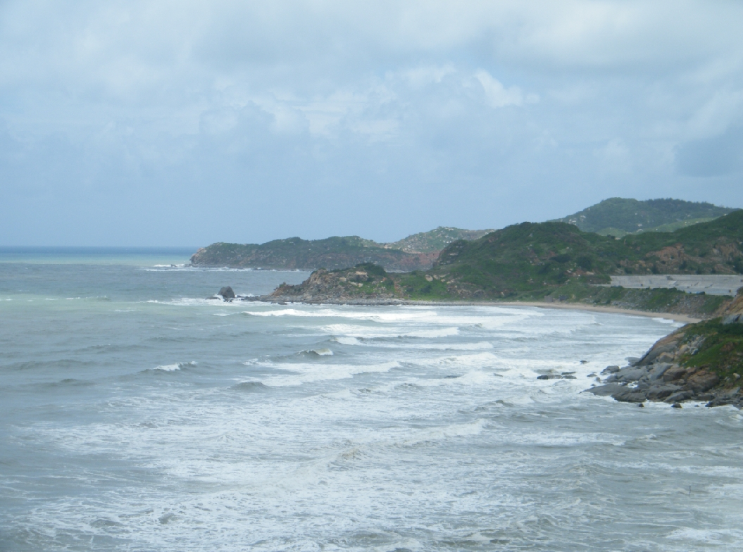 广澳大山 东面 由北向南望 尖石角，南牙角